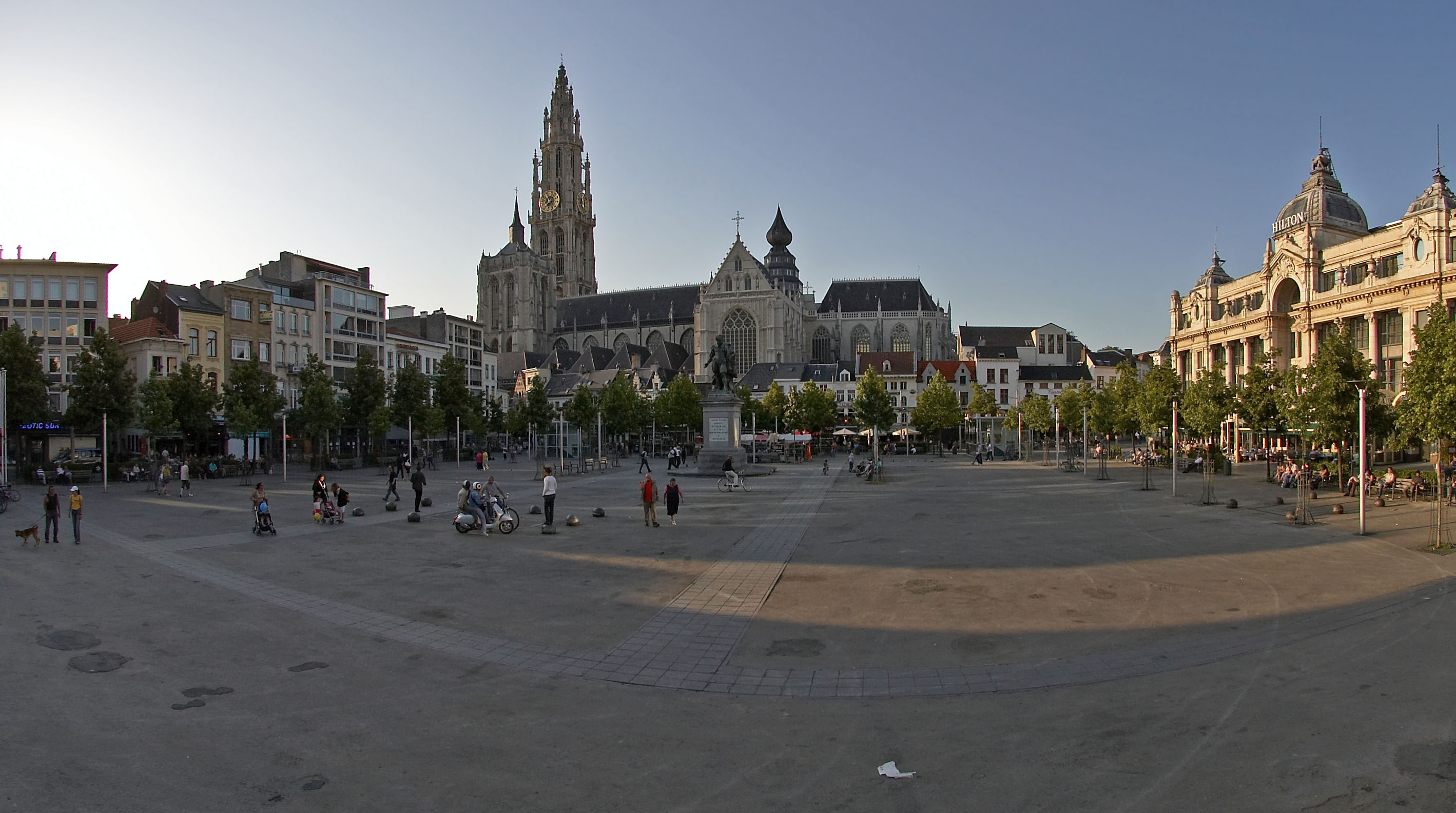 De Groenplaats met beeld van Rubens en de Onze-Lieve-Vrouwekathedraal in Antwerpen, België